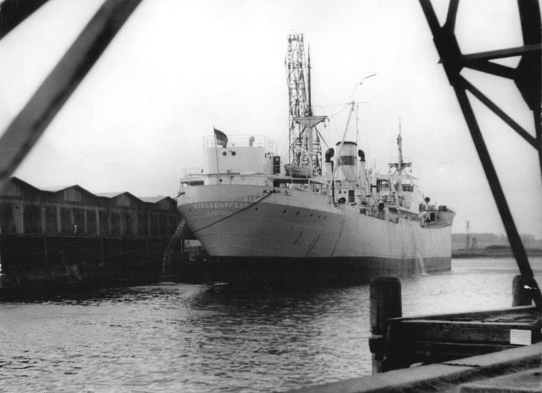 Wismar, Hafen, Frachter Zentralbild Mellahn 4.1.1959 "Steckenpferd"-Frachter in Wismar eingetroffen Der aus Mitteln der Steckenpferdbewegung in Schweden erworbene 10000-Tonnen-Frachter ist im Wismarer Hafen eingetroffen. Das Schiff wird am 5.1.1959 unter dem Namen "Steckenpferd" von der Deutschen Seereederei in Dienst gestellt. UBz: Der Frachter im Wismarer Hafen. Information added by Wikimedia users.*IMO number: 5339468